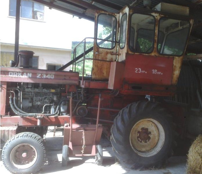 Orkan Z340 widoczny z prawej strony